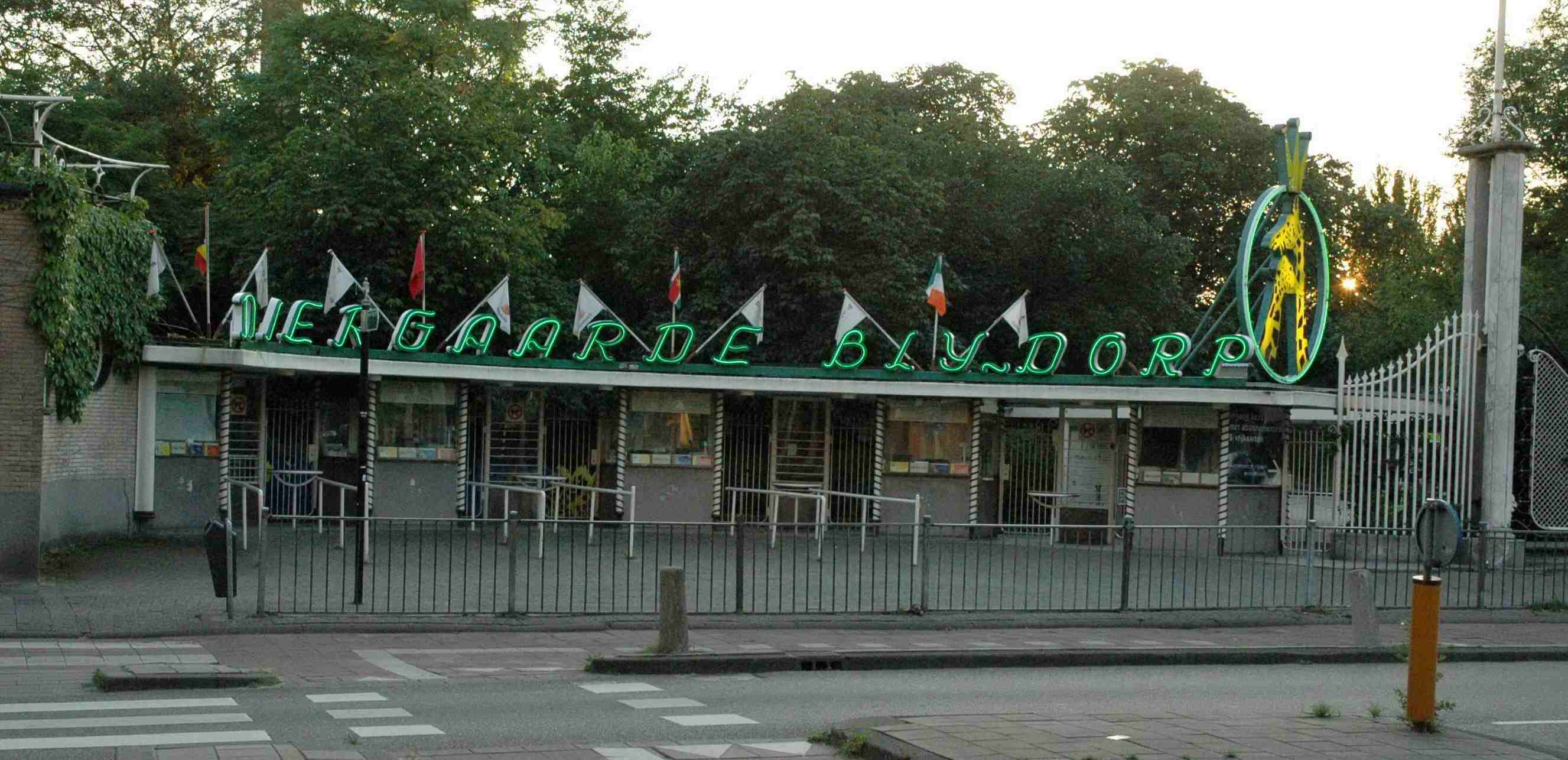 Diergaarde Blijdorp, Rotterdam, oude ingang aan de van Aertsenlaan. Eigen werk (Own work). (Diergaarde Blijdorp / Rotterdam Zoo. Old entrance at the Aertsenlaan.)